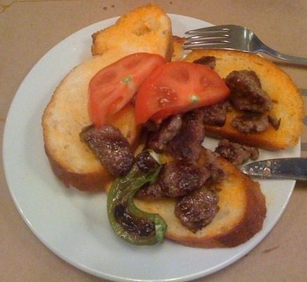 Islama köfte